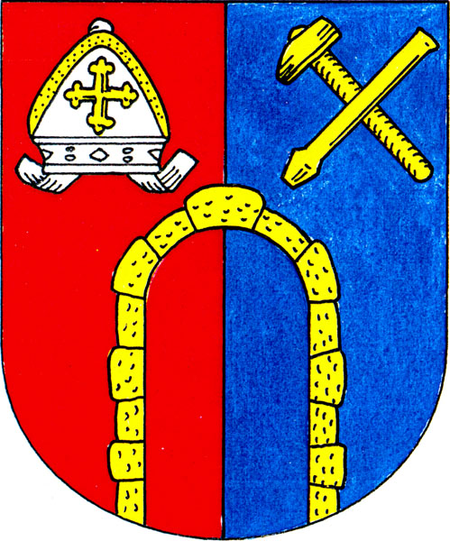 Znak obce Mikulovice (okres Jeseník)